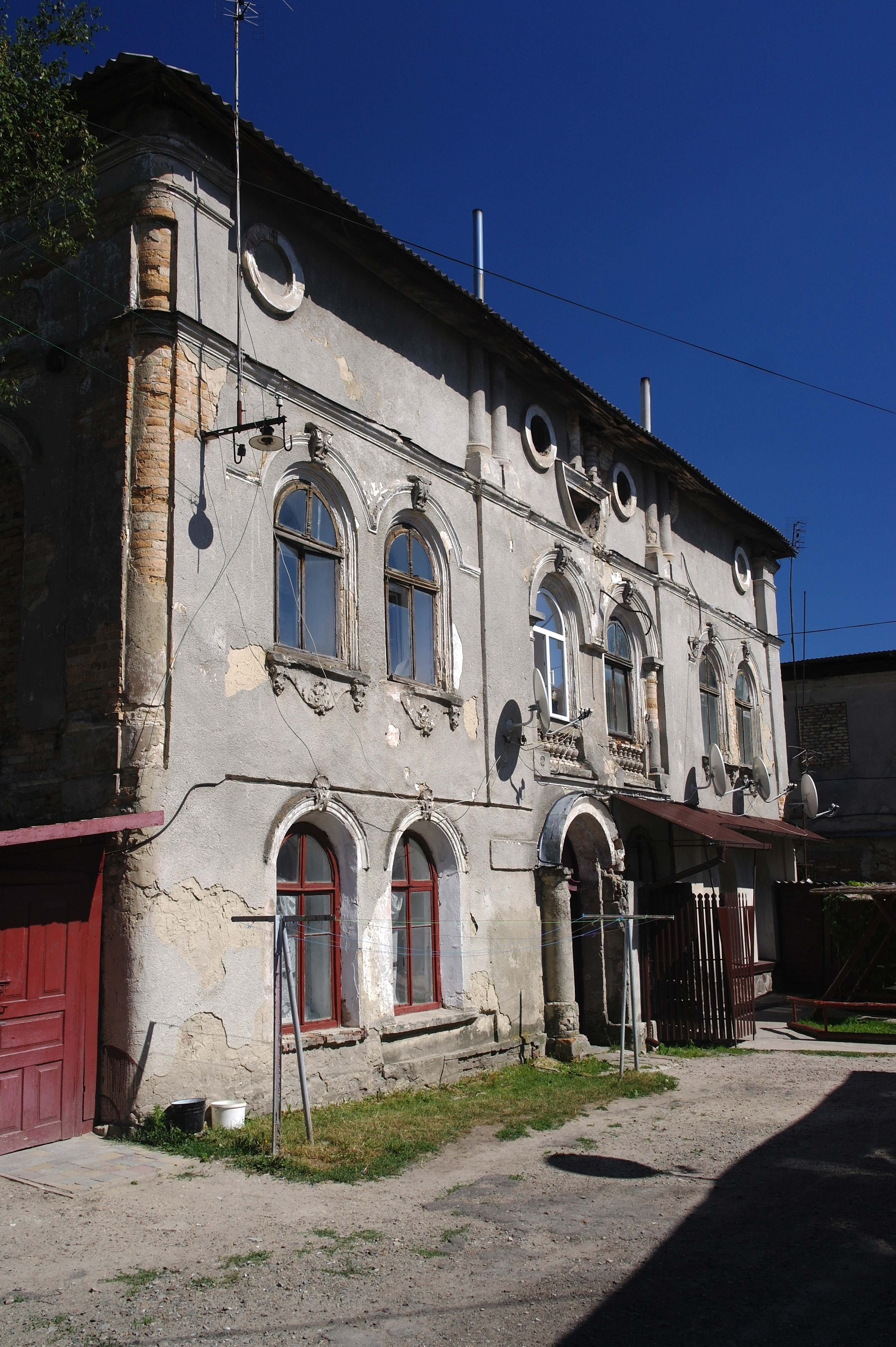 Буськ, вул. Буського братства, 3